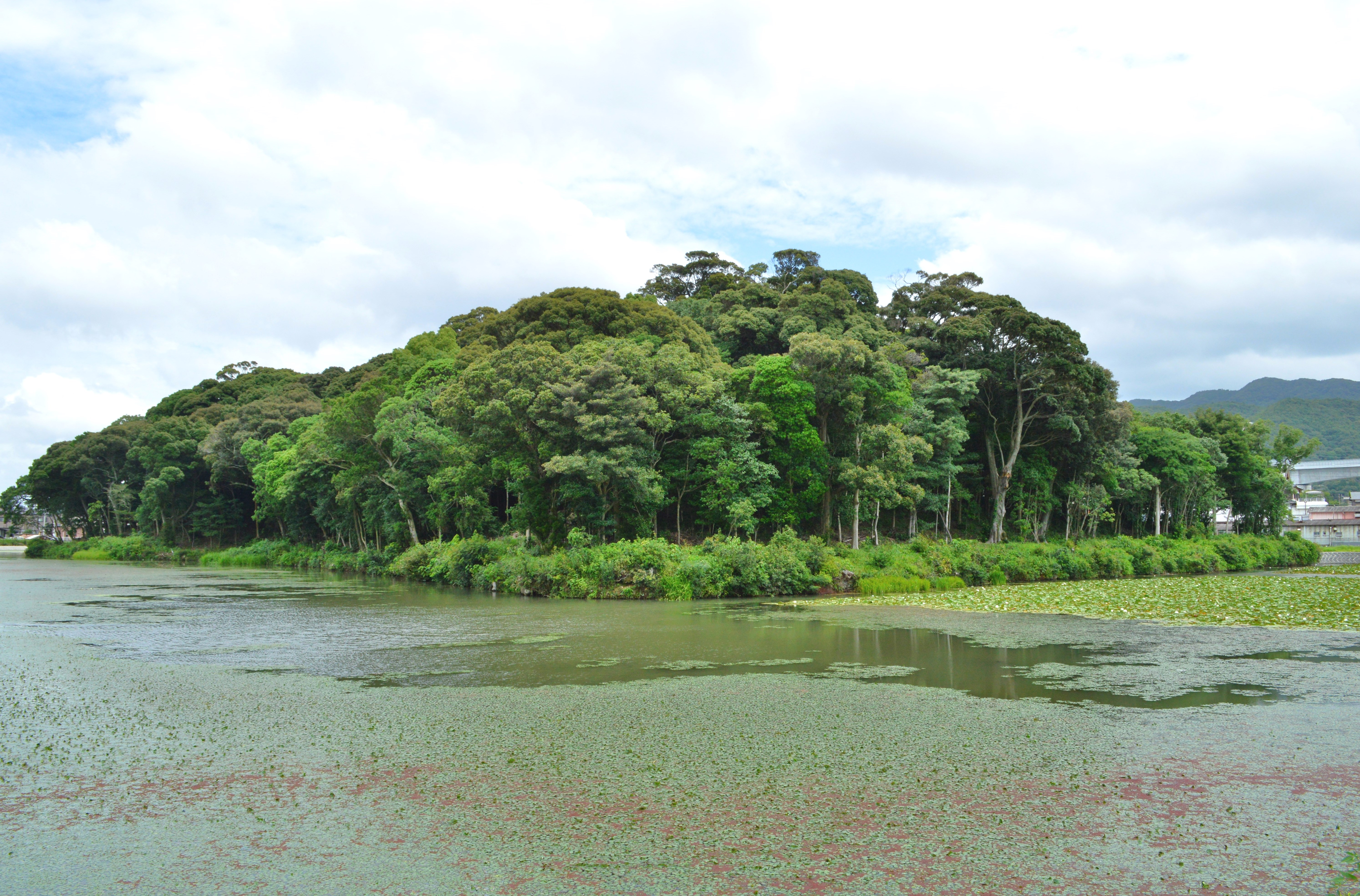 淡輪ニサンザイ古墳 全景